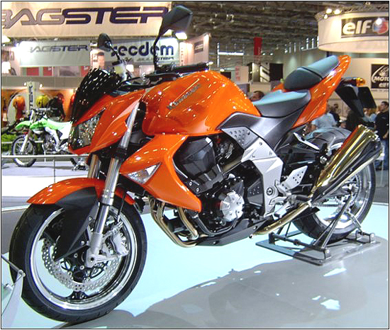 Kawasaki Z1000 2007